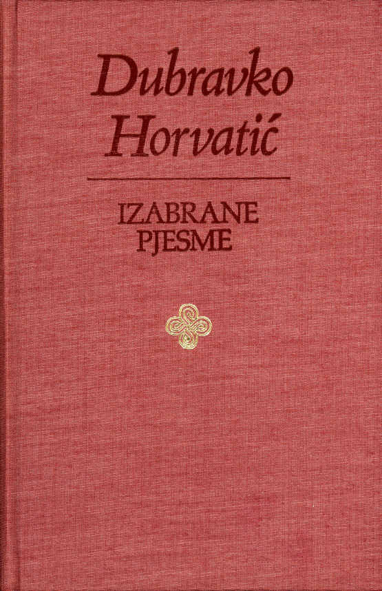 Dubravko Horvatić - Izabrane pjesme